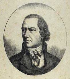 Jakob Brønnum Scavenius (2.4.1749-20.6.1820), dansk godsejer